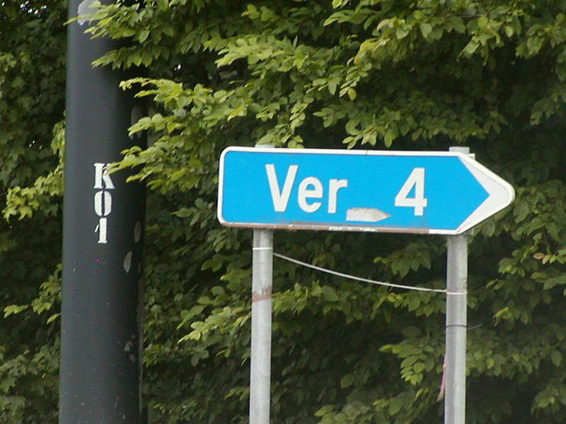 wegwijzer naar Ver (B)